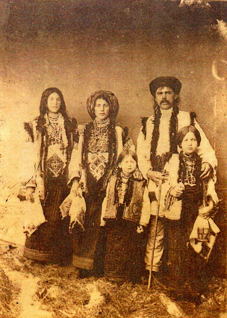 Буковинські гуцули